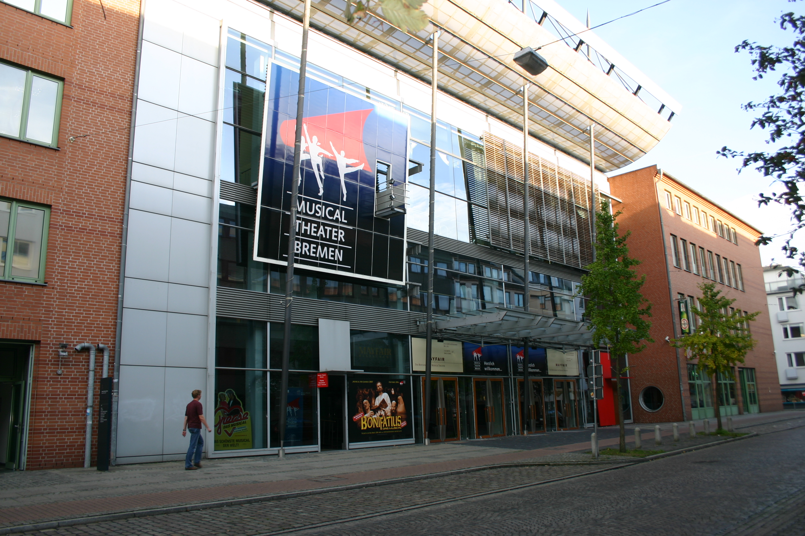 Vorderansicht Musicaltheater Bremen, Ansicht von Links